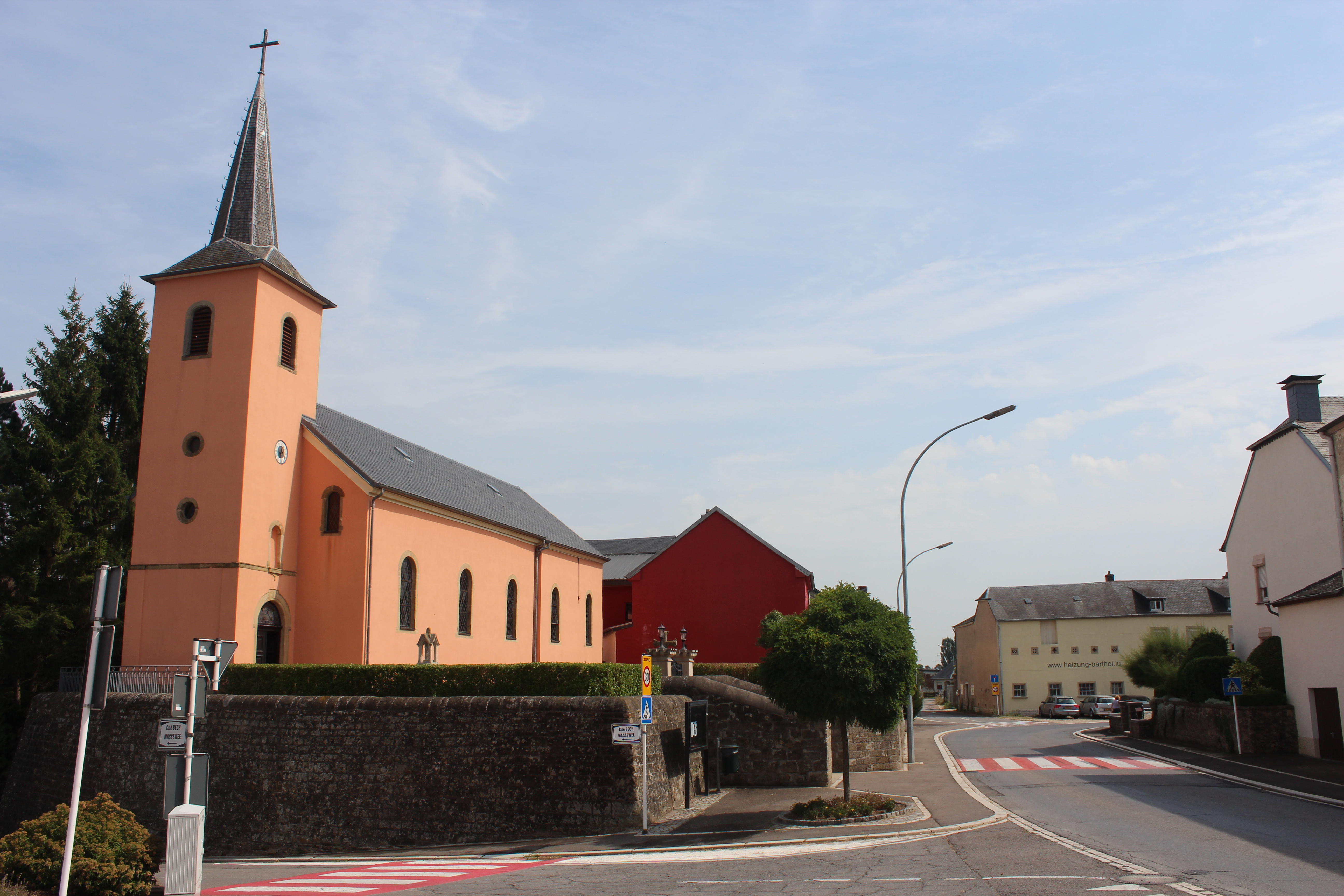 Duerfzentrum vu Gonnereng, 2012